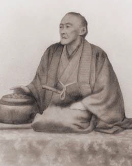 土井利忠の肖像写真。